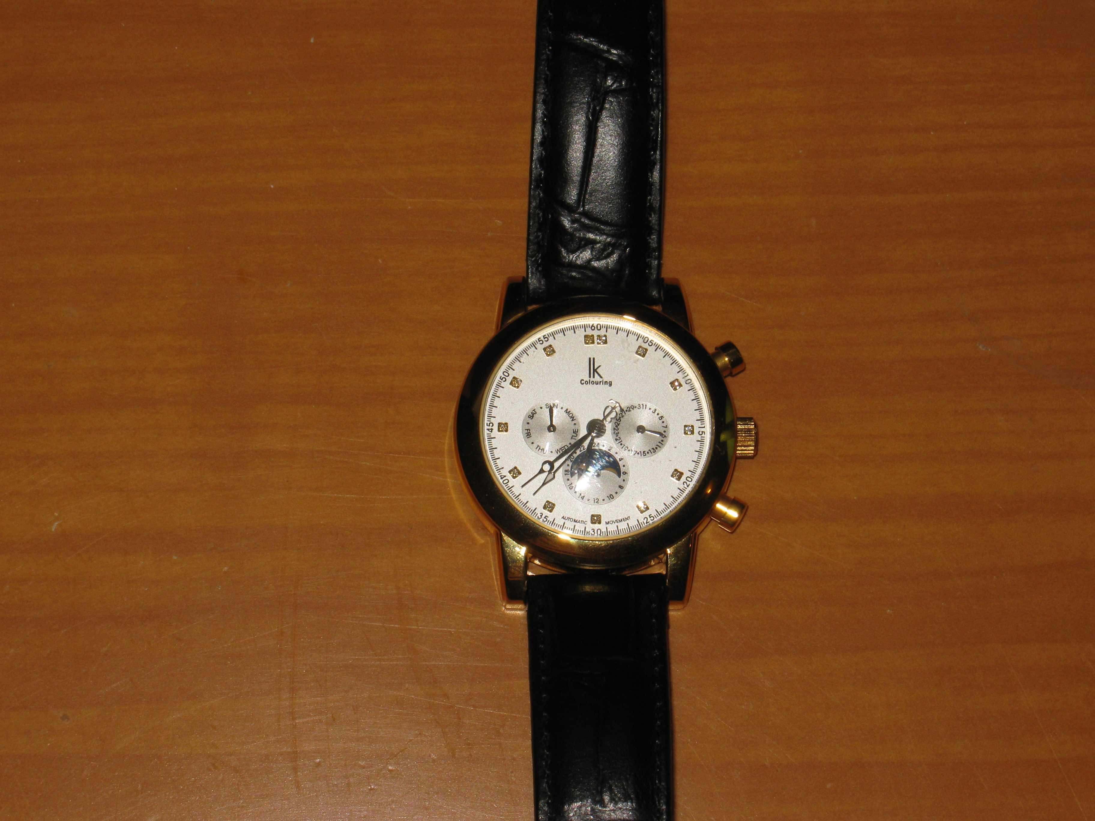 hodinky IK Colouring